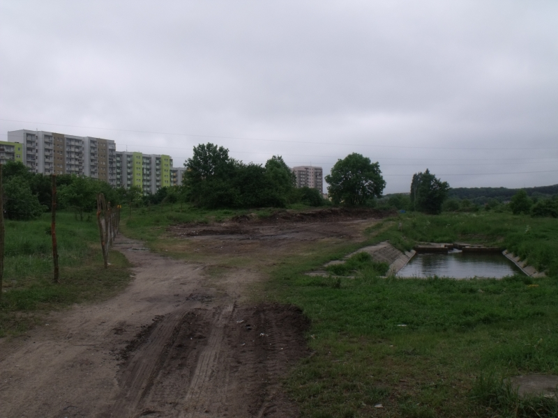 Widok na tymczasową pętlę "Turkusowa", będąca obecnie w budowie